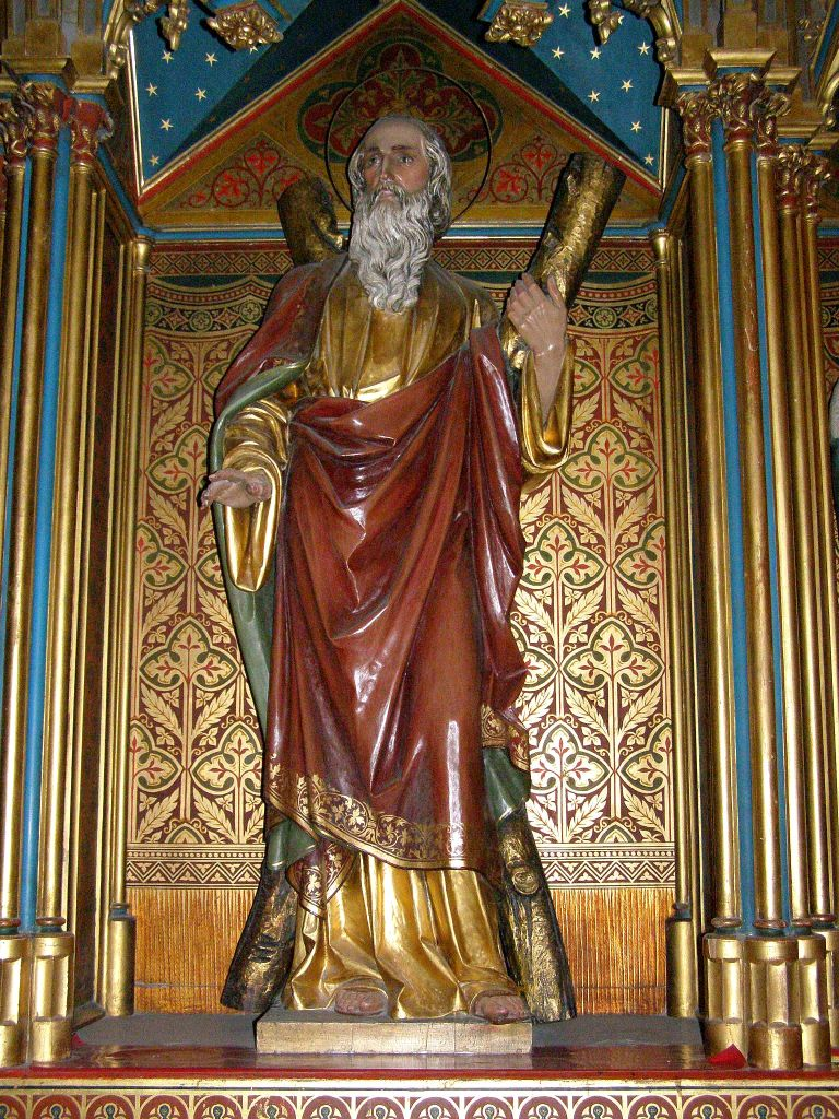 Socha svätého Ondreja. Pôvodne na mieste sochy mala stáť socha Piety (dnes umiestnená na vedľajšom oltári)